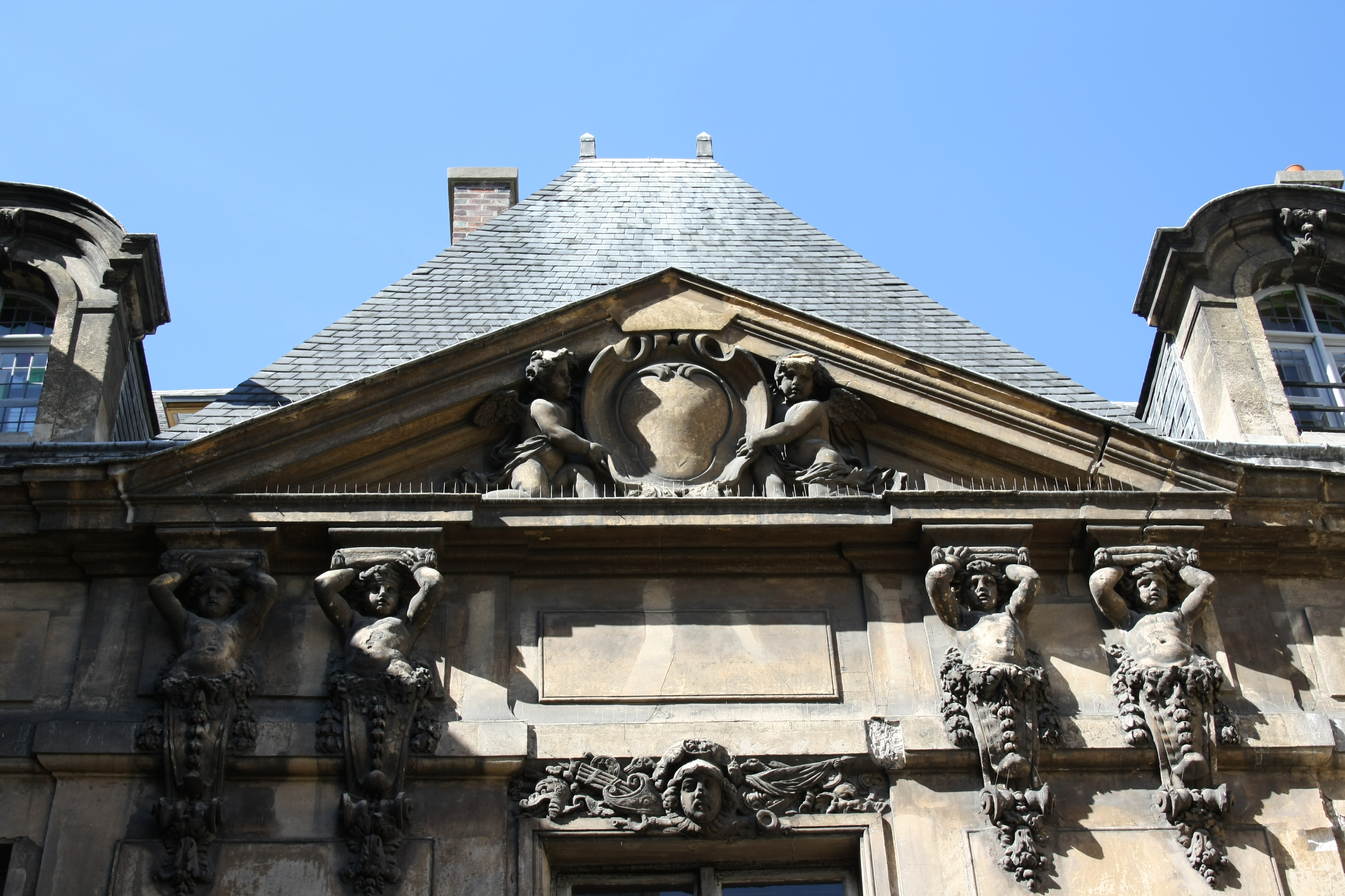 Hôtel Amelot de Bisseuil (47, rue Vieille-du-Tempel bzw. 10, rue des Guillemites in Paris): Giebel mit Atlanten